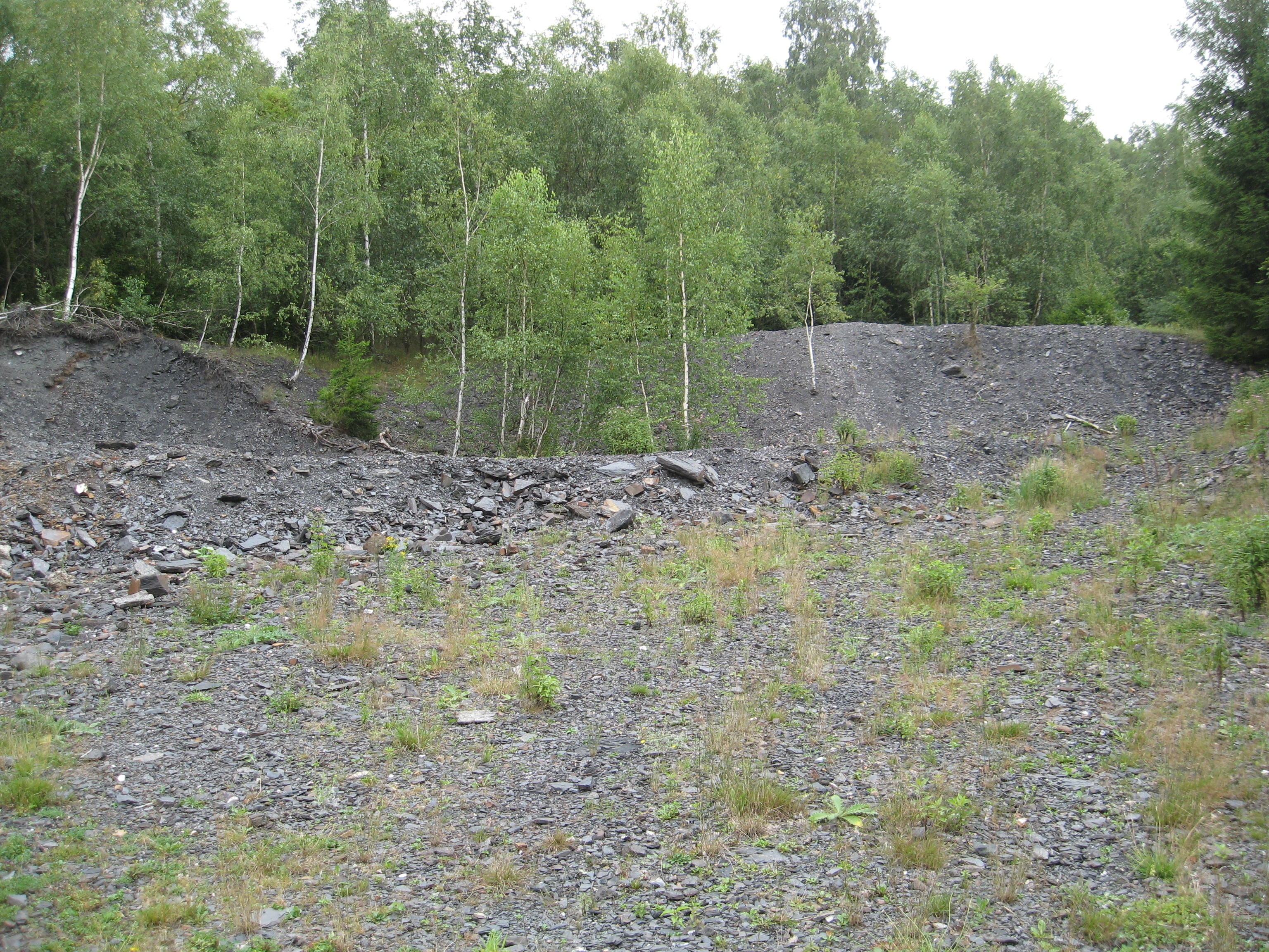 Schachtstandort Lorenzschacht der Grube Bautenberg.